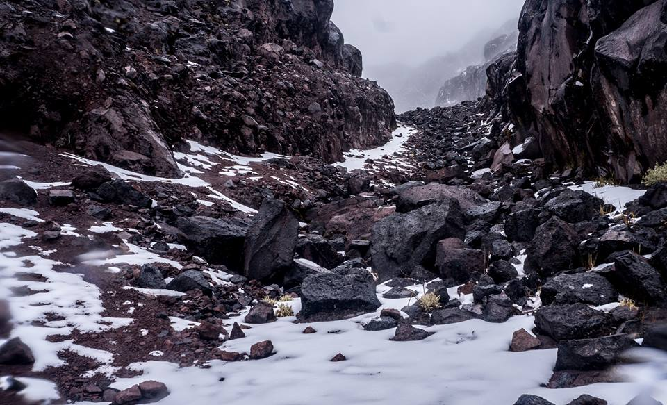 Nevado de Santa Isabel